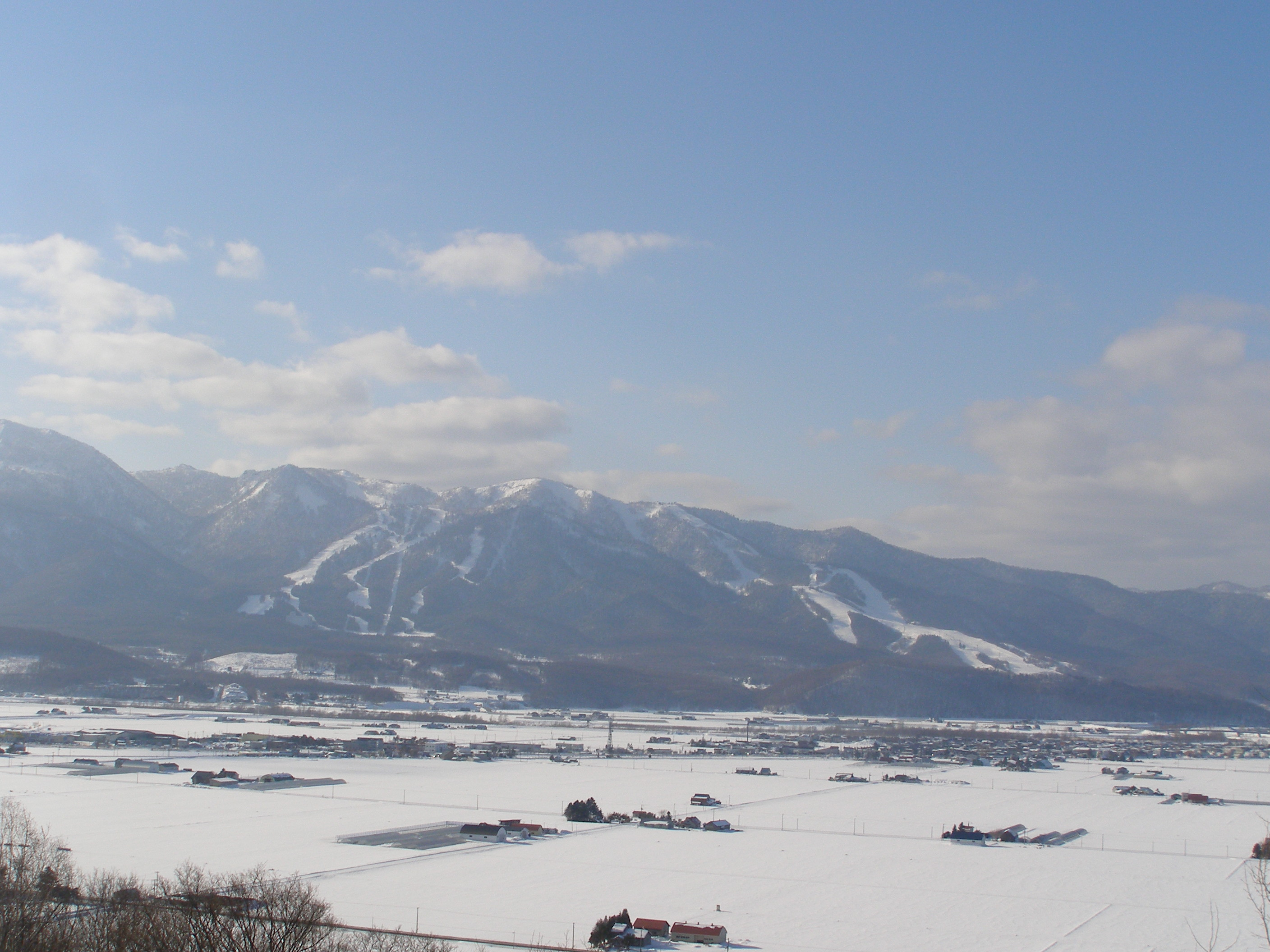 Furano Snow Resort (Hokkaido, JAPAN)富良野スキー場遠景 (北海道富良野市)